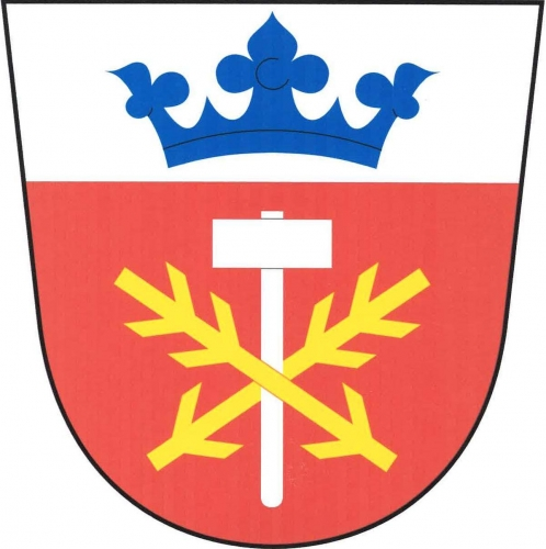 Znak, Prachovice, okres Chrudim